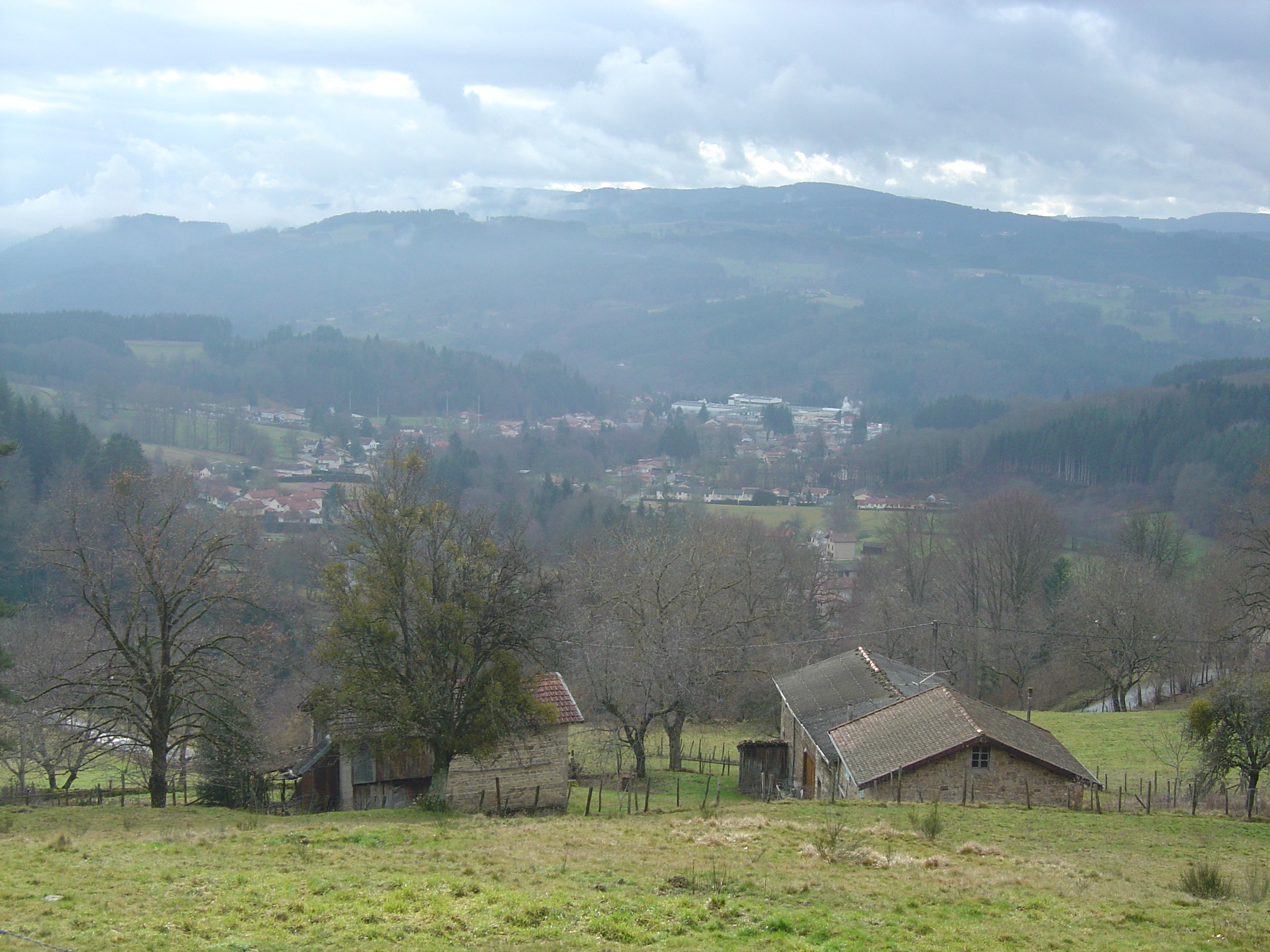 Vue générale de Vertolaye depuis la route montant à Saint-Pierre-la Bourlhonne